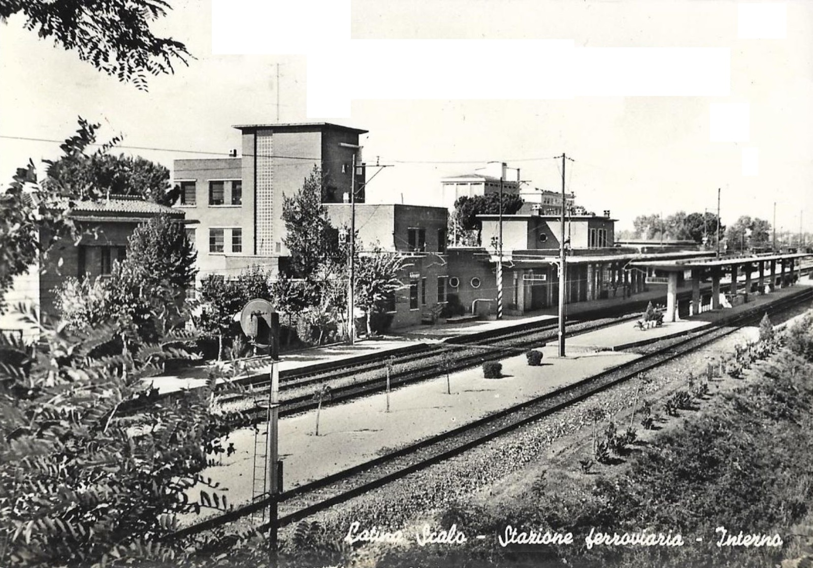 Latina Scalo - Stazione ferroviaria - Interno